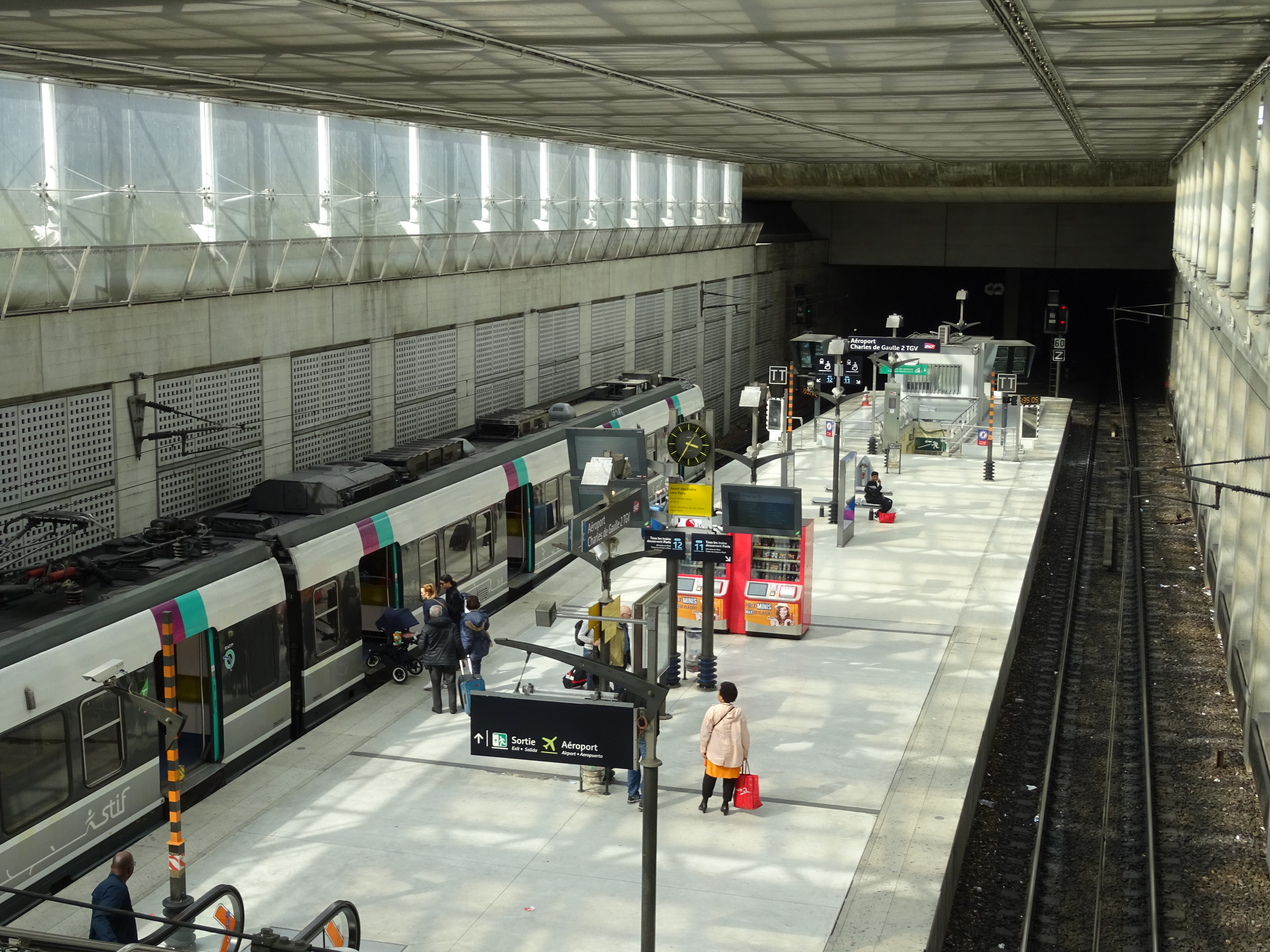 Gare RER Aéroport CDG2